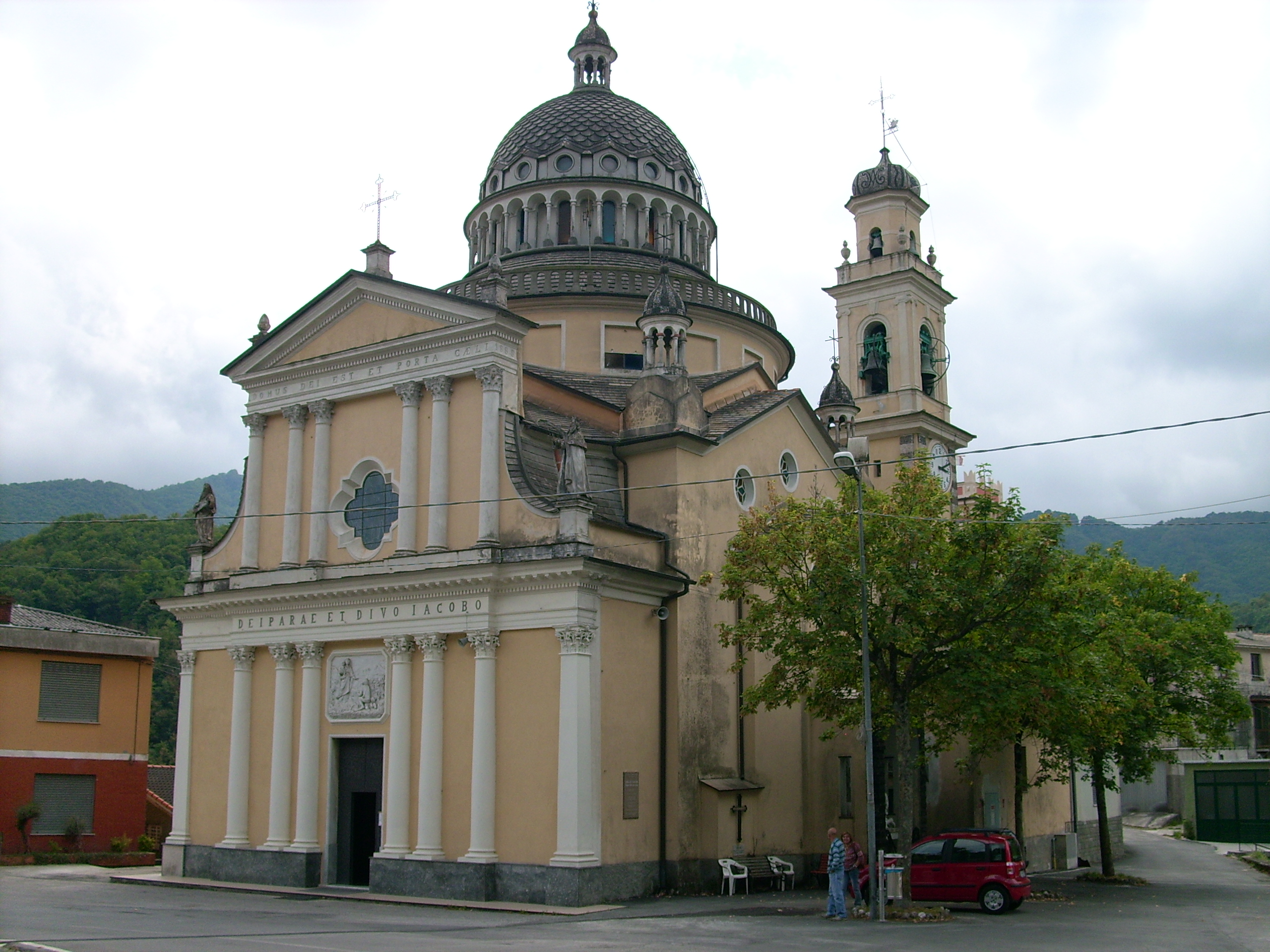 Santuario di Nostra Signora della Guardia presso Gattorna, Moconesi, Liguria, Italia